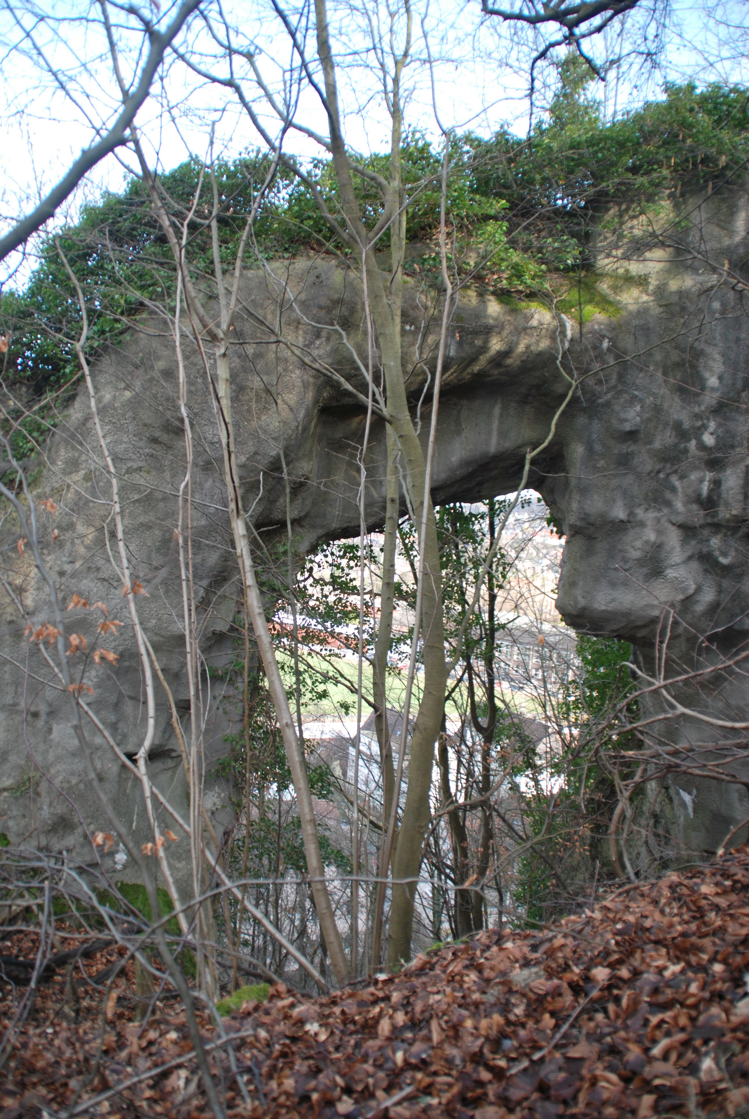 Frontalaufnahme der Hünenpforte Hagen